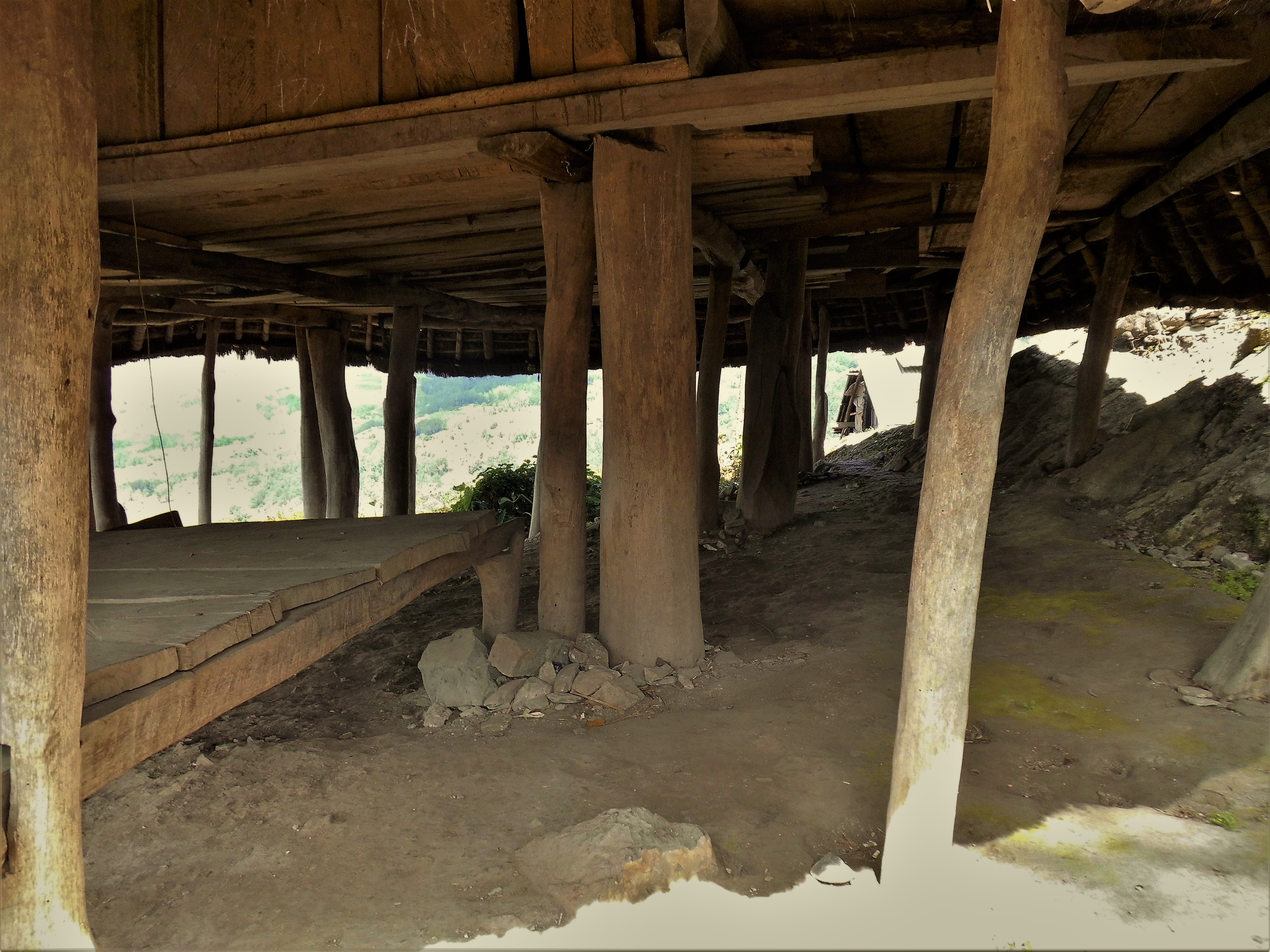 Maubisse